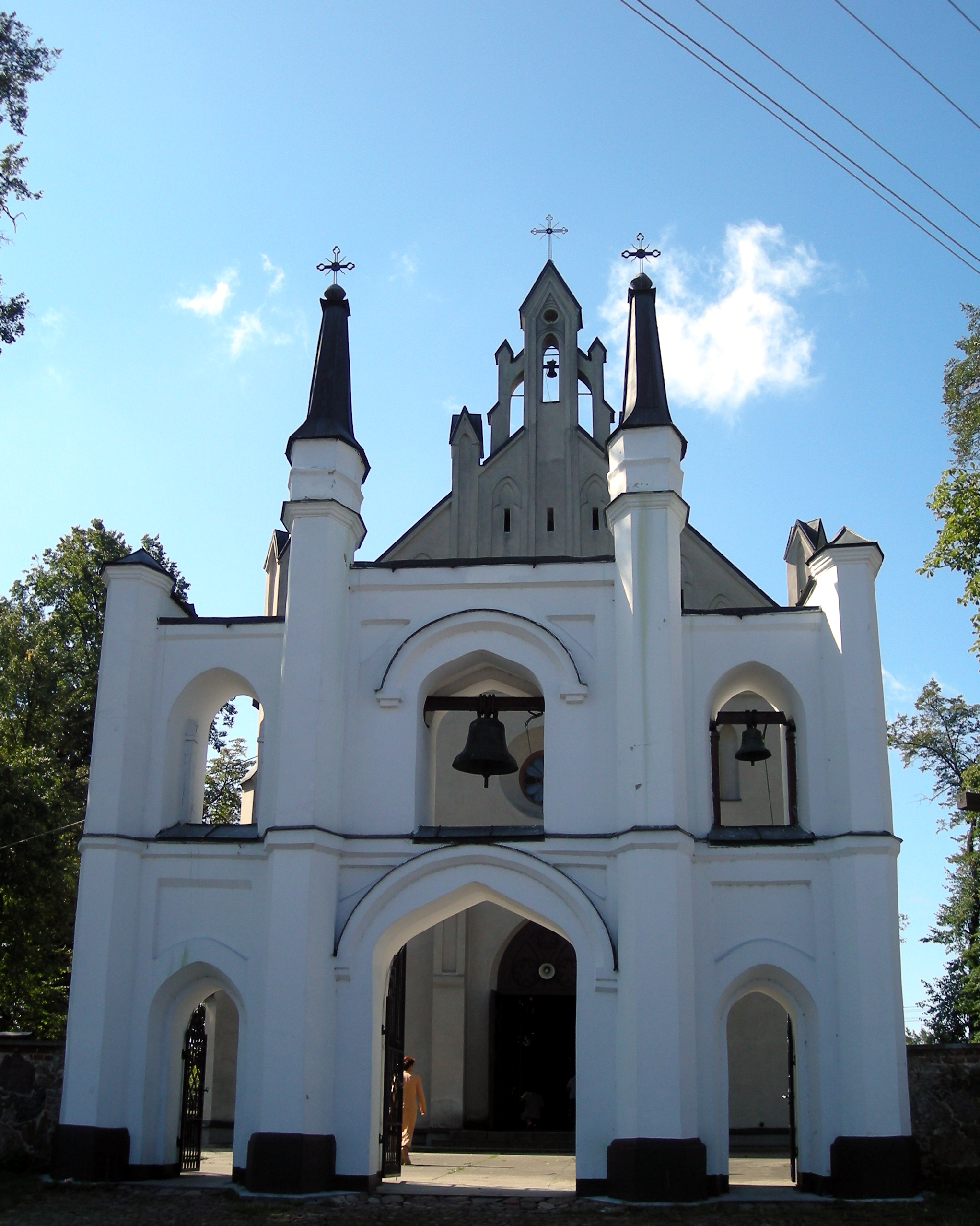 Kościół Parafialny w Huszlewie.